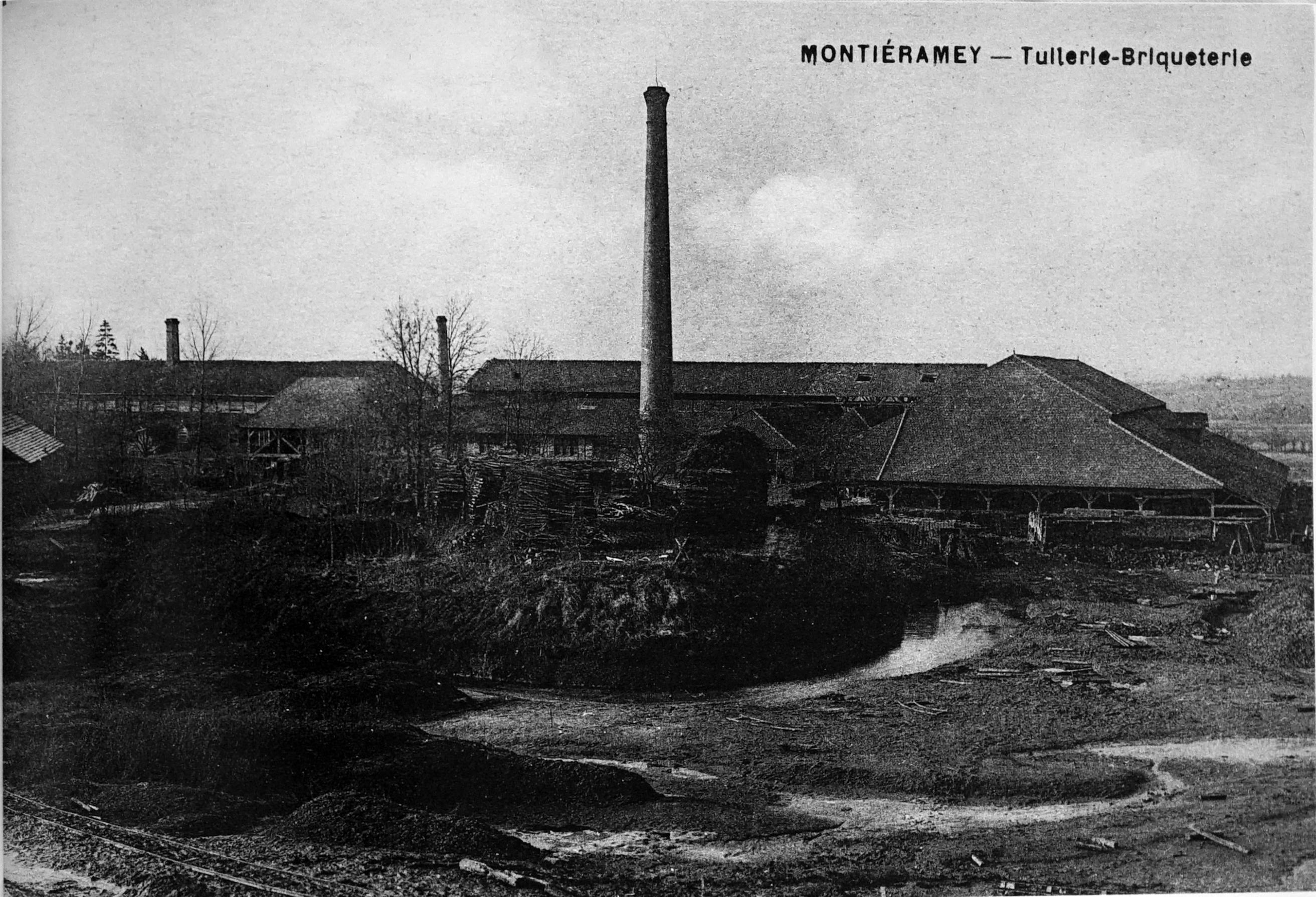 vue ancienne.